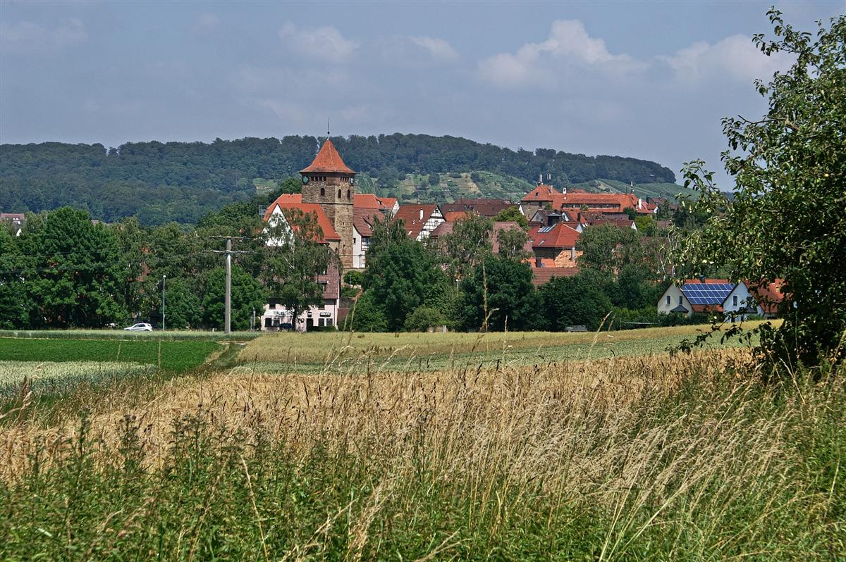 Ötisheim